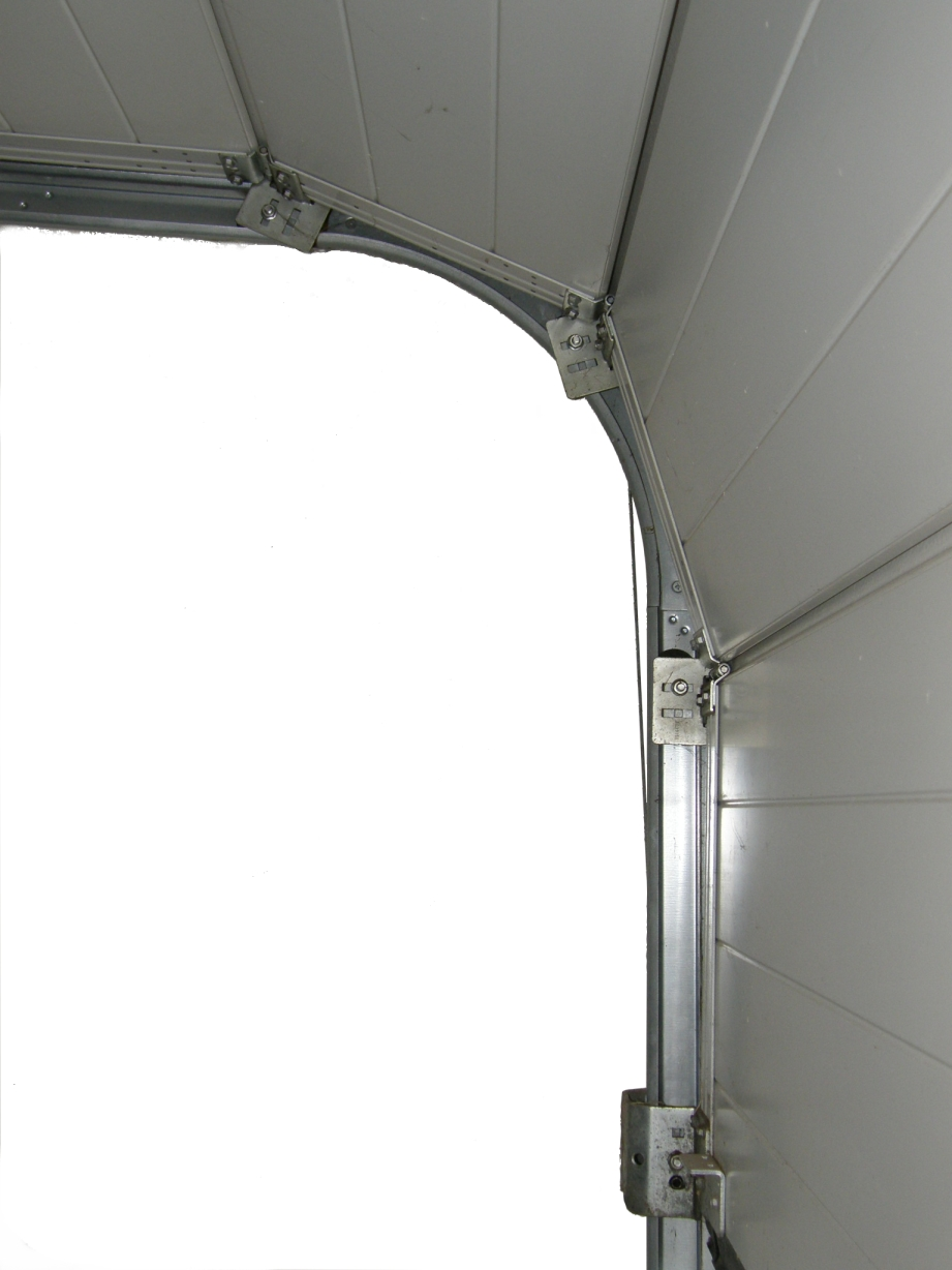 Sektionaltor